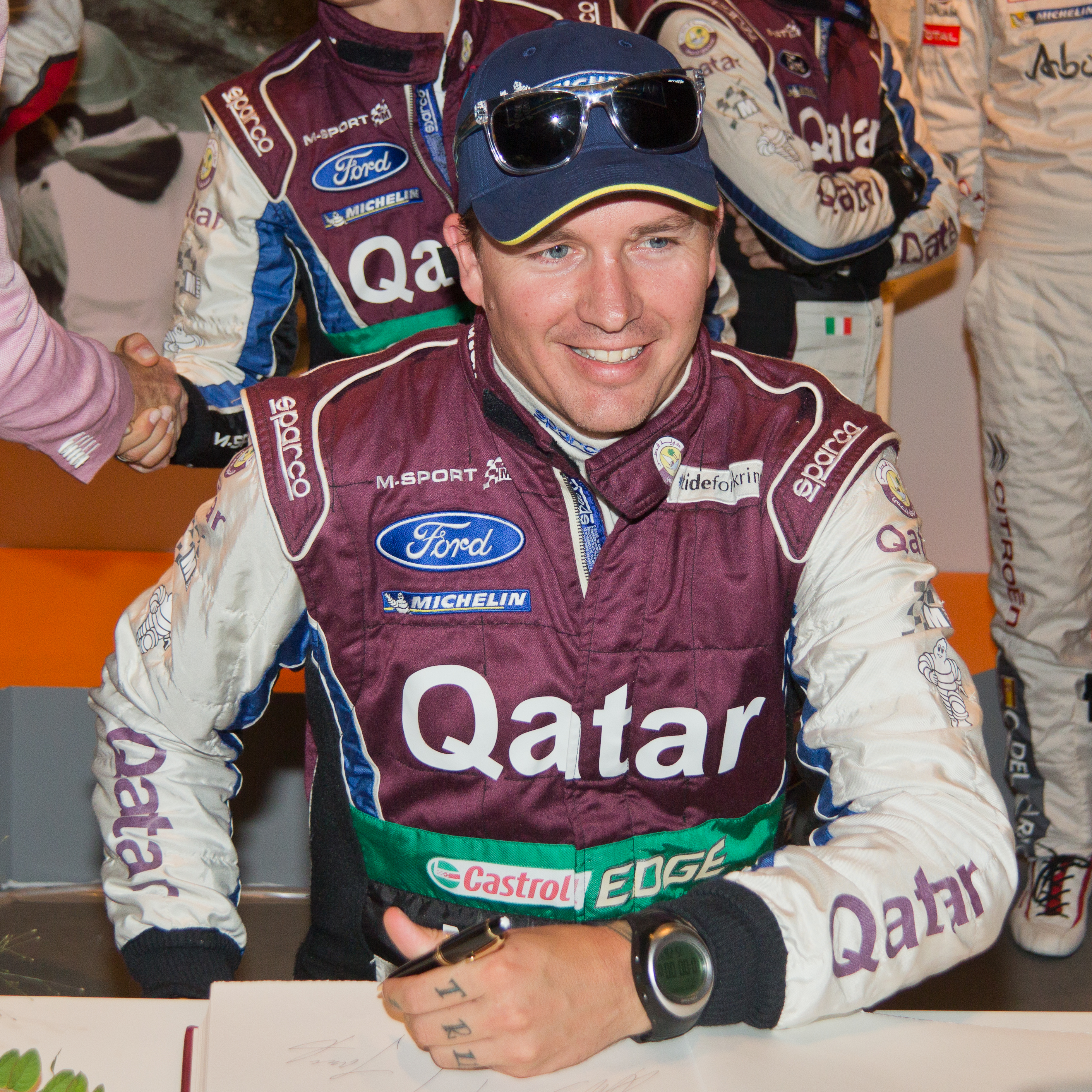 ADAC Rallye Deutschland 2013 - Empfang der Stadt Köln - Jonas Andersson. Eintragung in der Gästebuch der Stadt Köln